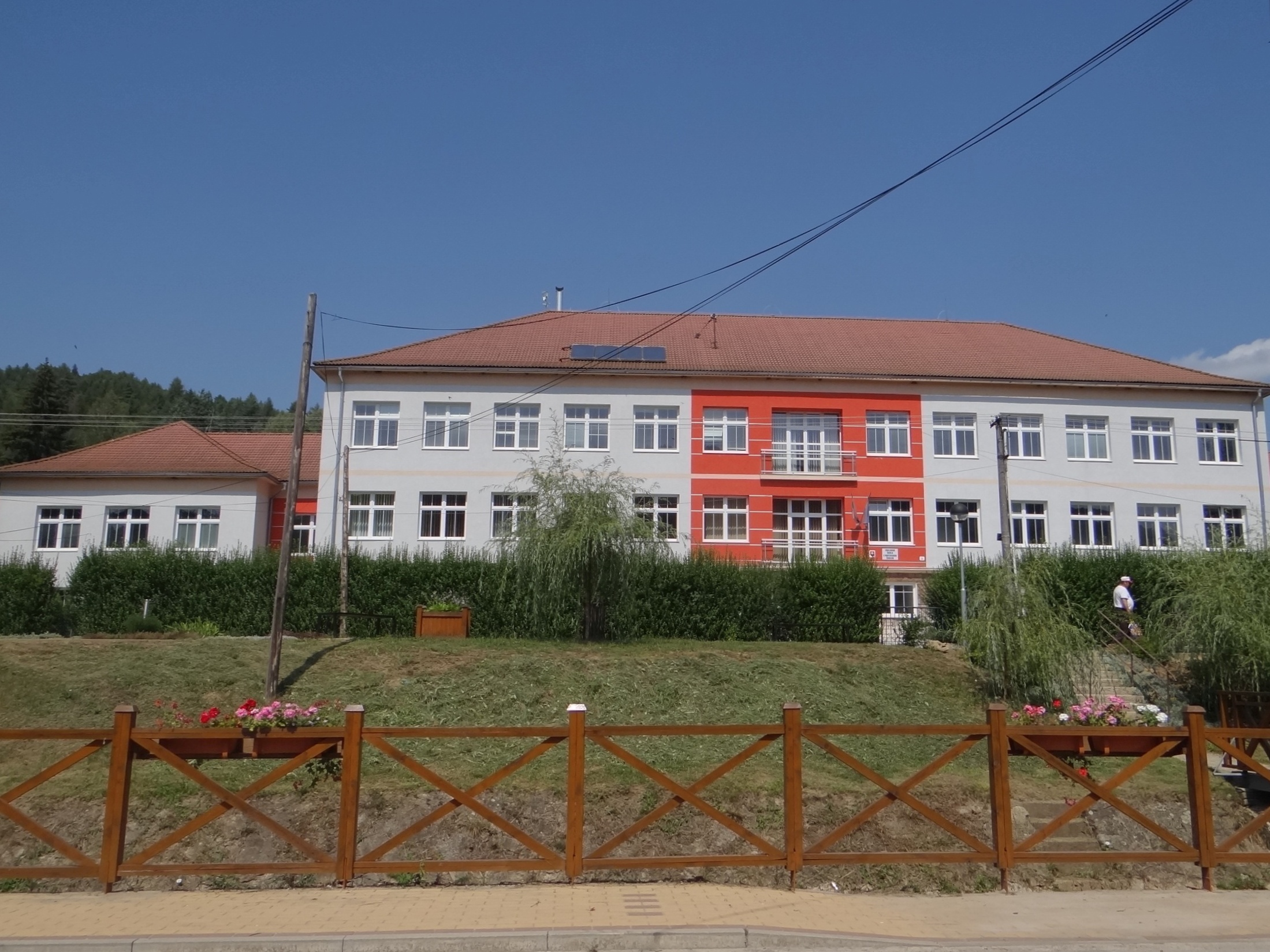 Nižná Slaná